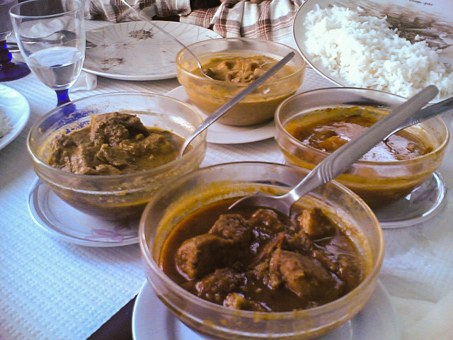 Vindalho, an indo-portuguese dish from Goa, India.